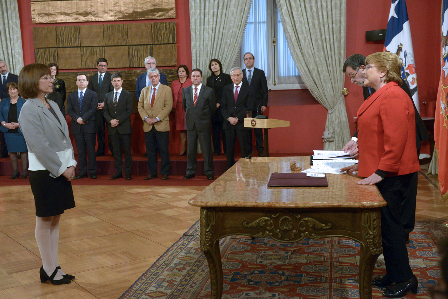 19 Octubre 2016, Ministro Marcelo Díaz participa en cambio de gabinete, luego realiza conferencia de prensa.